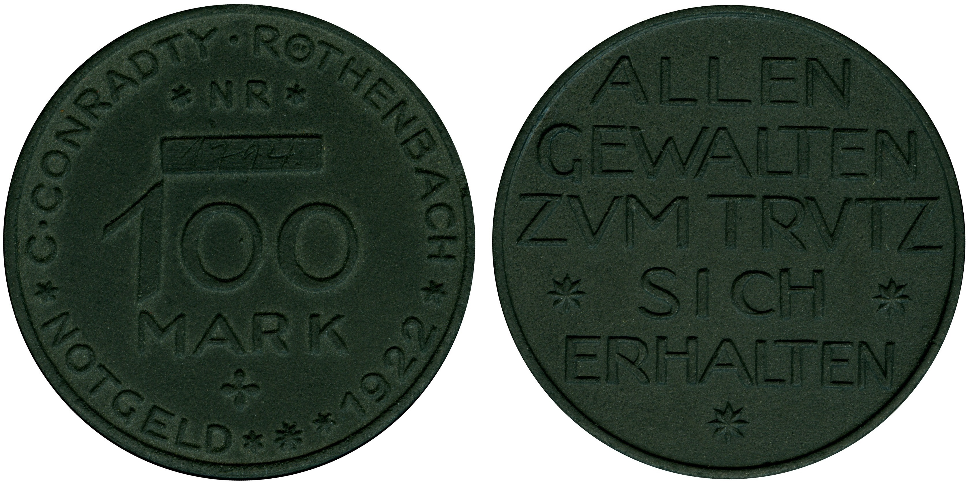 100 Mark Kohlemünze 1922 C. Conradty Röthenbach Auflage: 2500Ex. Kröner Katalog: C1.1